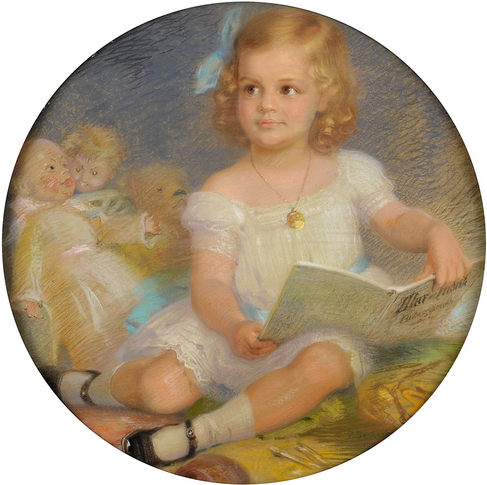 Mädchen mit dem Buch „Max und Moritz“. Signiert. Datiert 1911. Pastell. Ø 70 cm